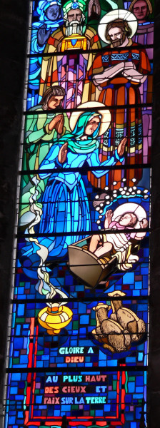 goetzenbruck